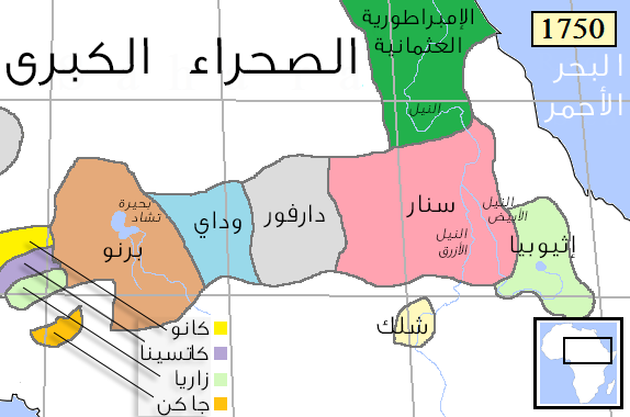 خريطة شرق ووسط أفريقيا في عام 1750.